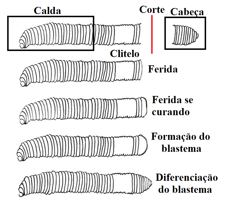 Diagrama esquemático de uma lesão se curando e se regenerando. As setas denotam o local da amputação em Eudrilus eugeniae.